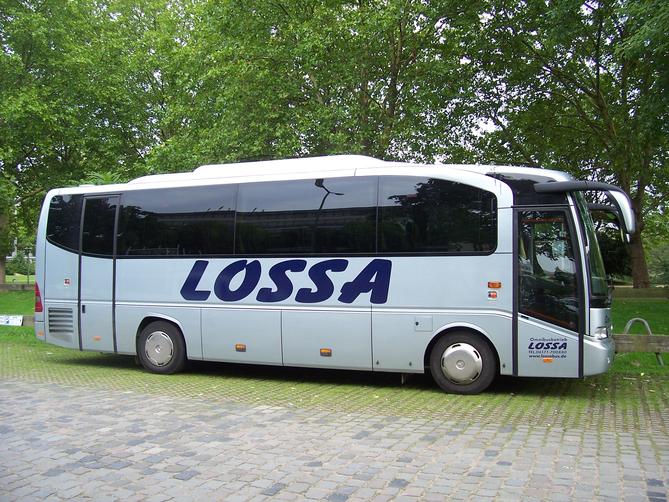 Ein Mercedes-Benz Tourino Reisebus in Mannheim